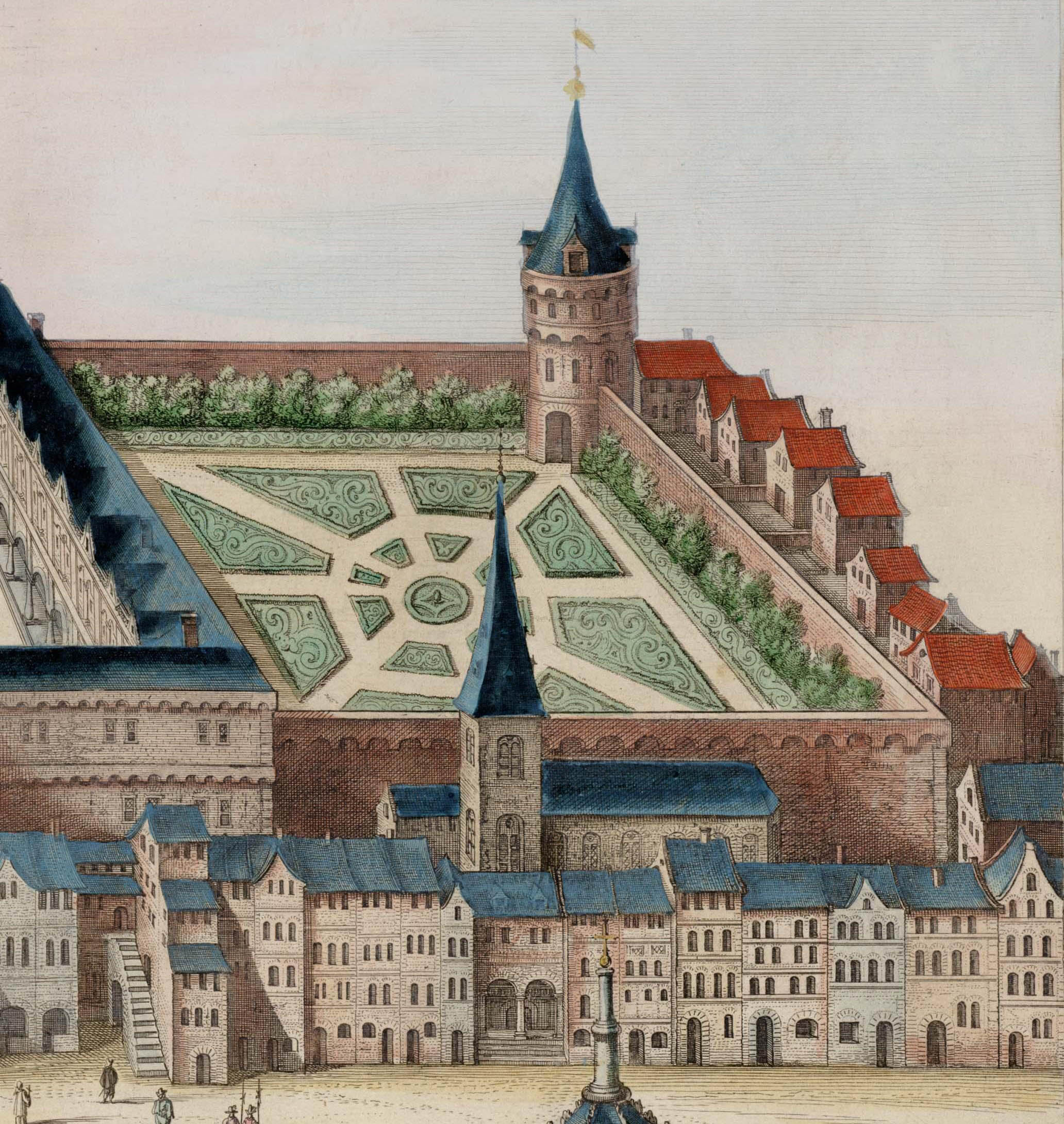 Palais des Prince évèque de Liège extrait 3e cour